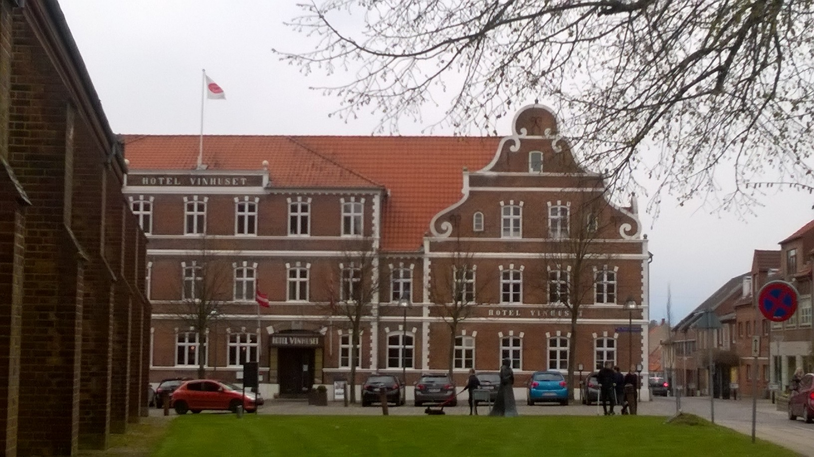 Hotel Vinhuset i Næstved.